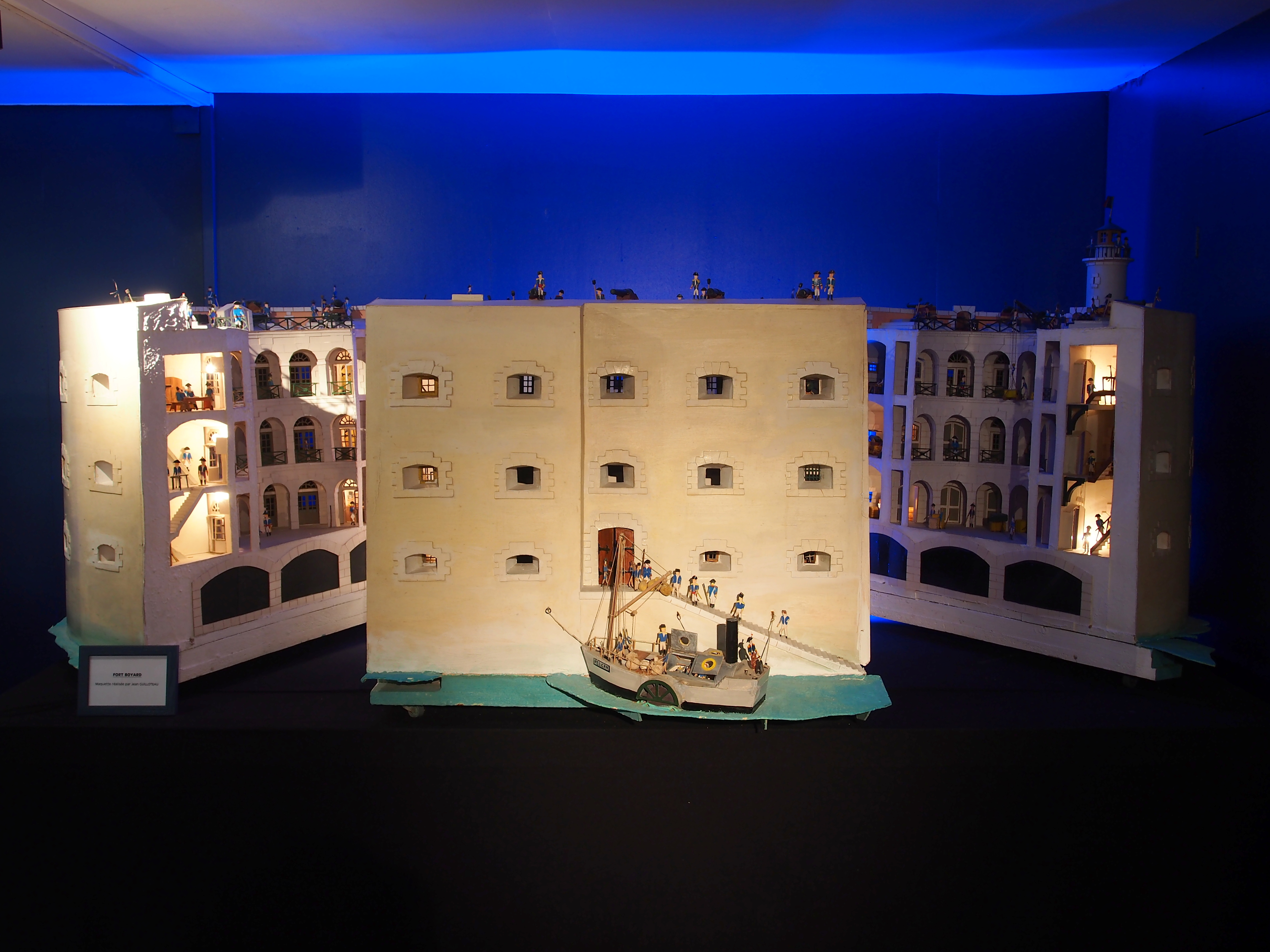 Photographed in Musée des modèles réduits, La Rochelle, France.